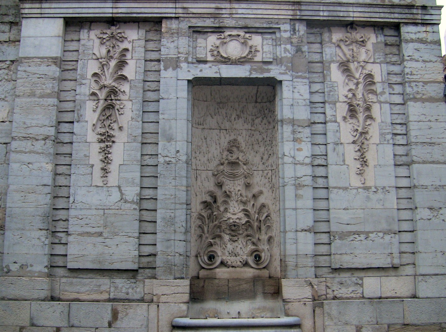 Fontaine des Clarisses, situé rue Megevand, à Besançon (Doubs, France).